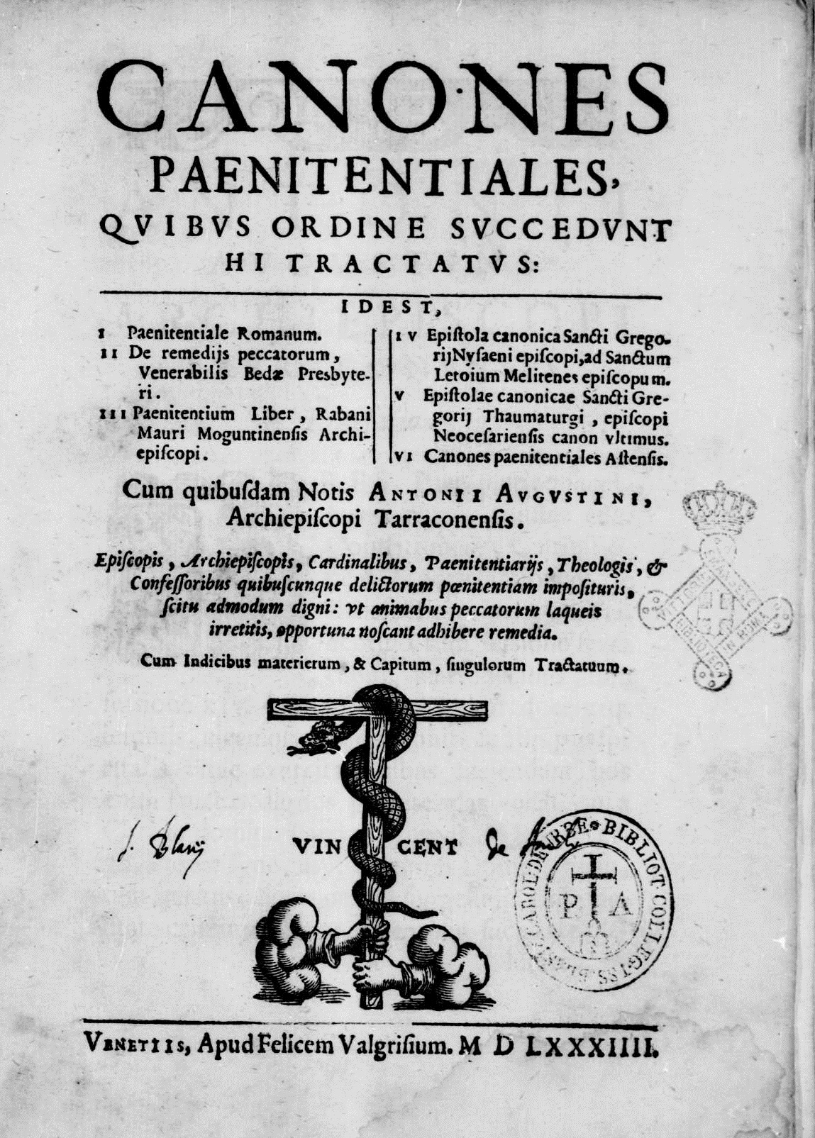 Frontespizio